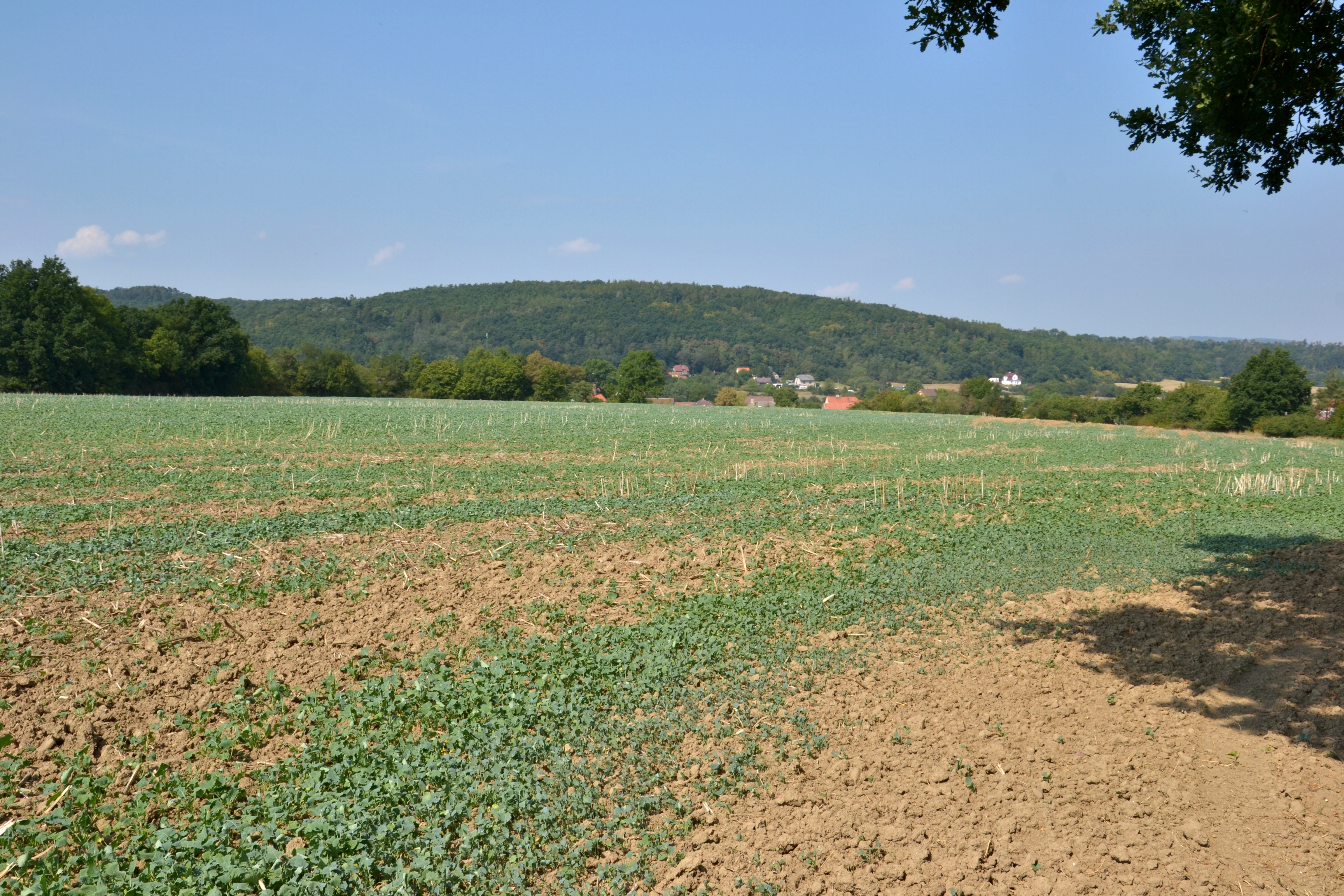 Prostor mezi zaniklým prvním a druhým valem